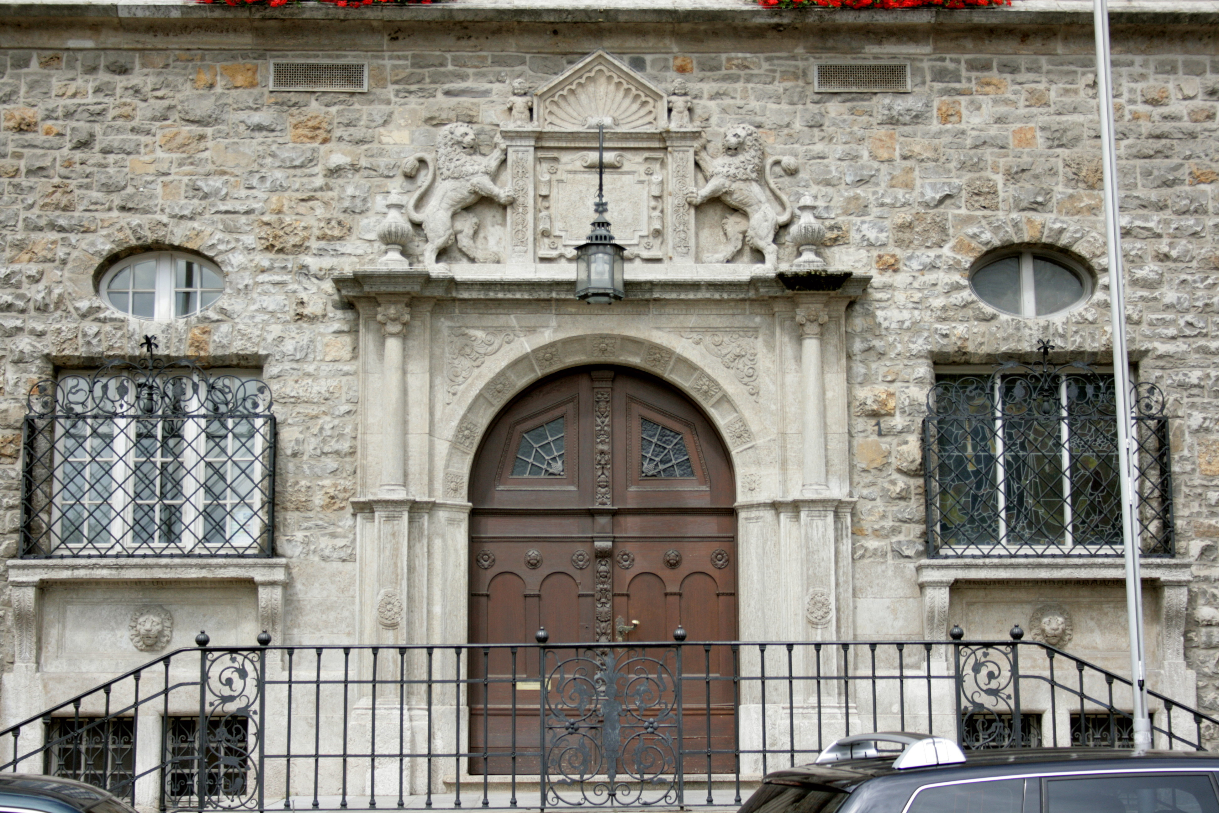 Altes Rathaus am Konrad-Adenauer-Platz in Bergisch Gladbach